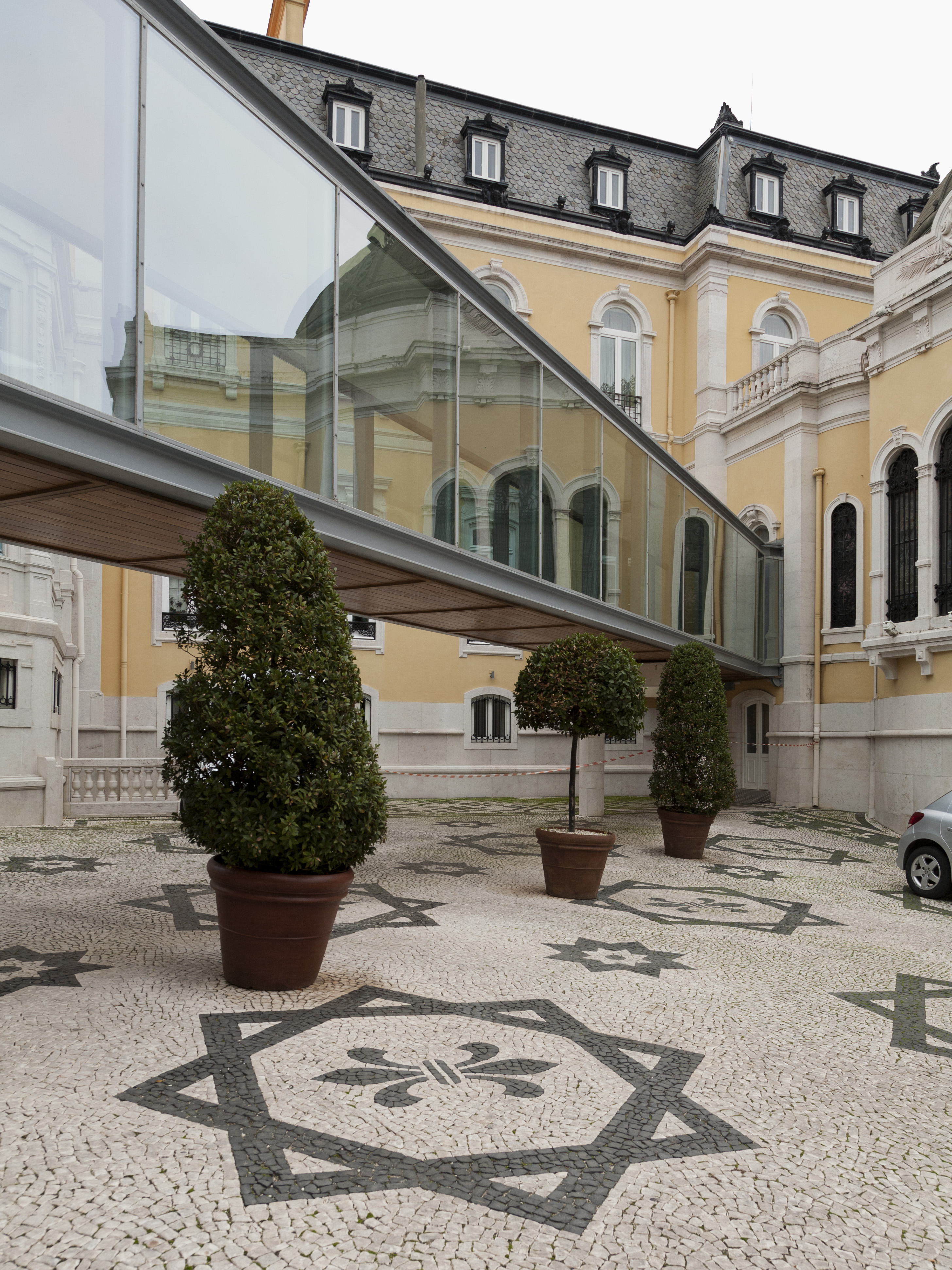 Hotel Petana Palace, Palácio Vale Flor, Lisboa; Arq. Manuel Tainha